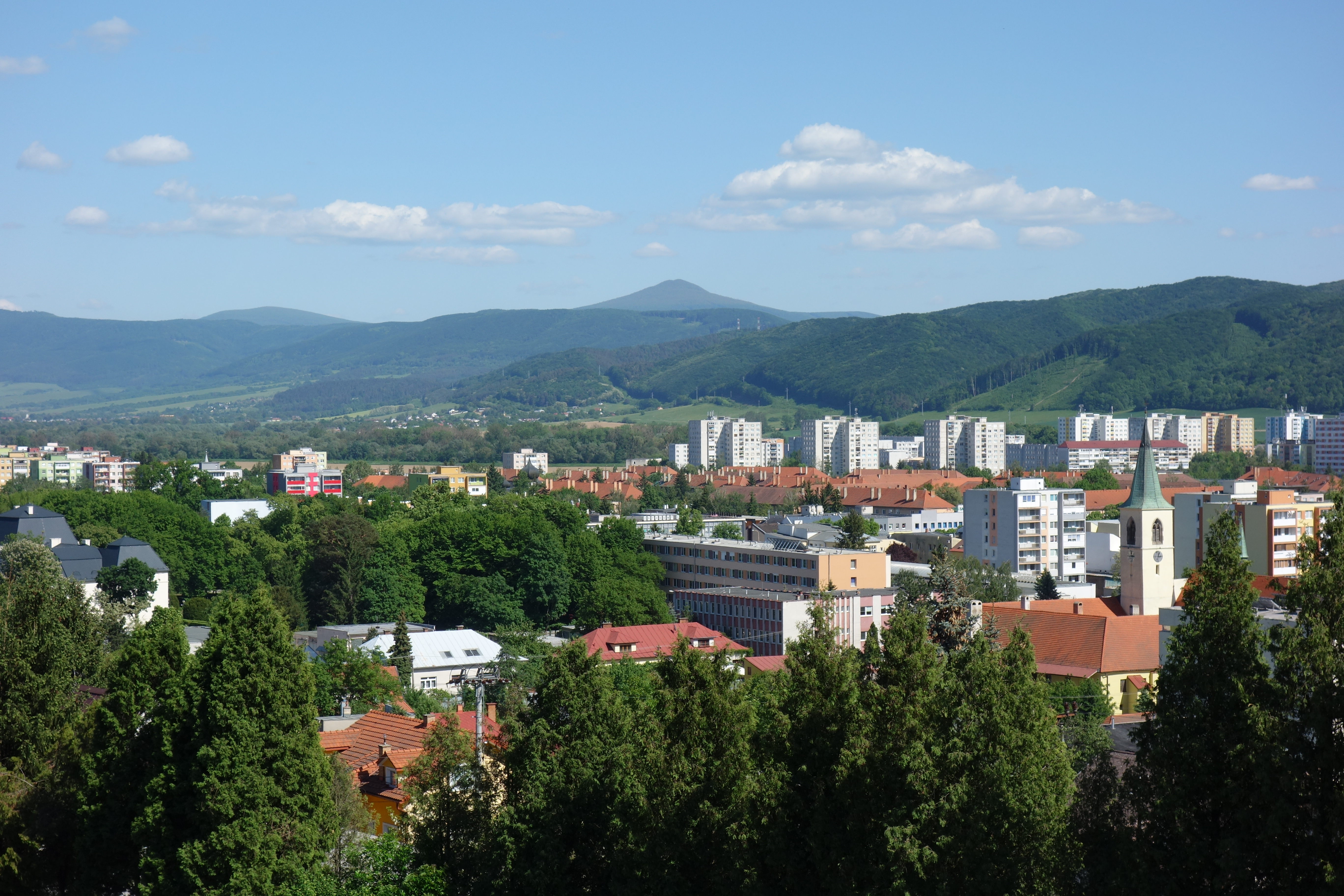 Pohľad na mesto Humenné od severozápadu, v pozadí Vihorlat